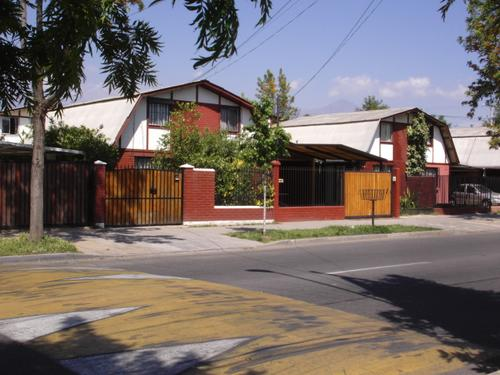 Barrio de clase media (predominante en Puente Alto) en calle Coquimbo. Puente Alto, Chile.